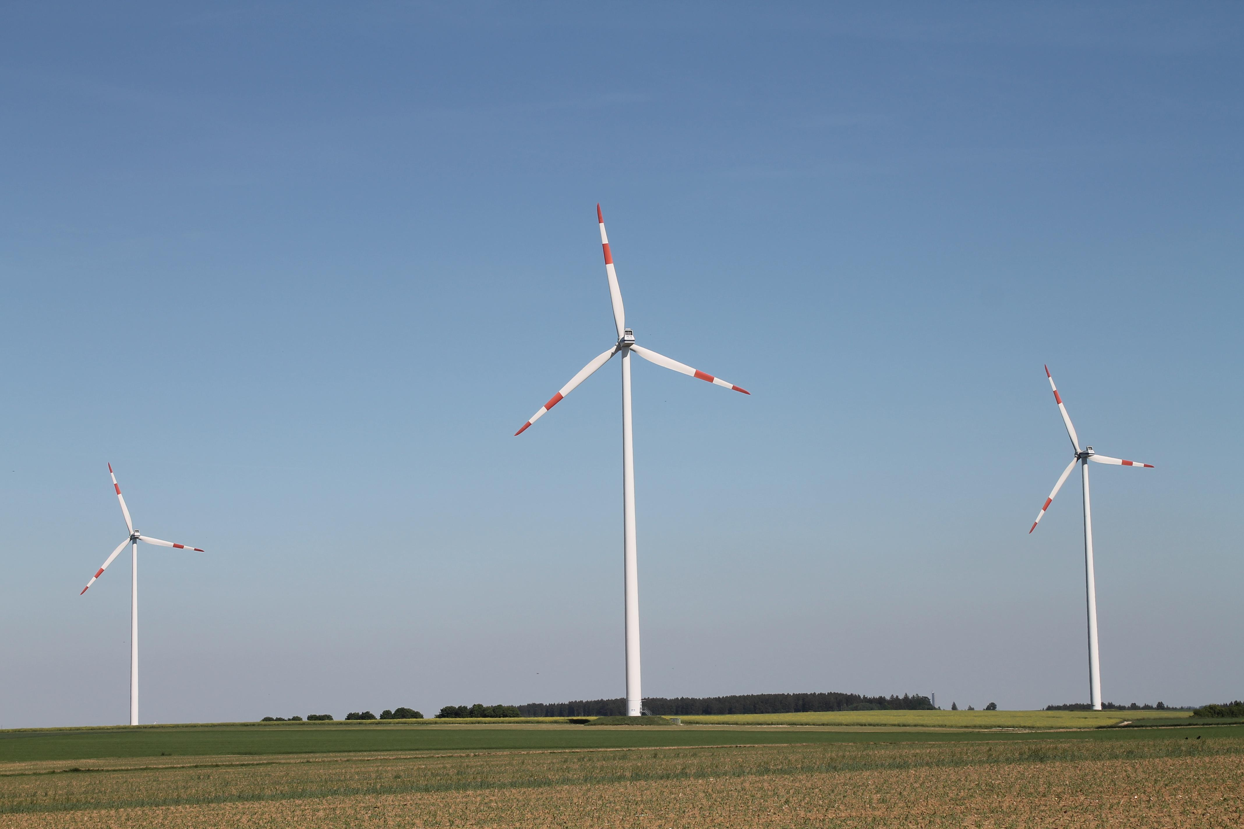 Windräder an der Keltischen Schanze